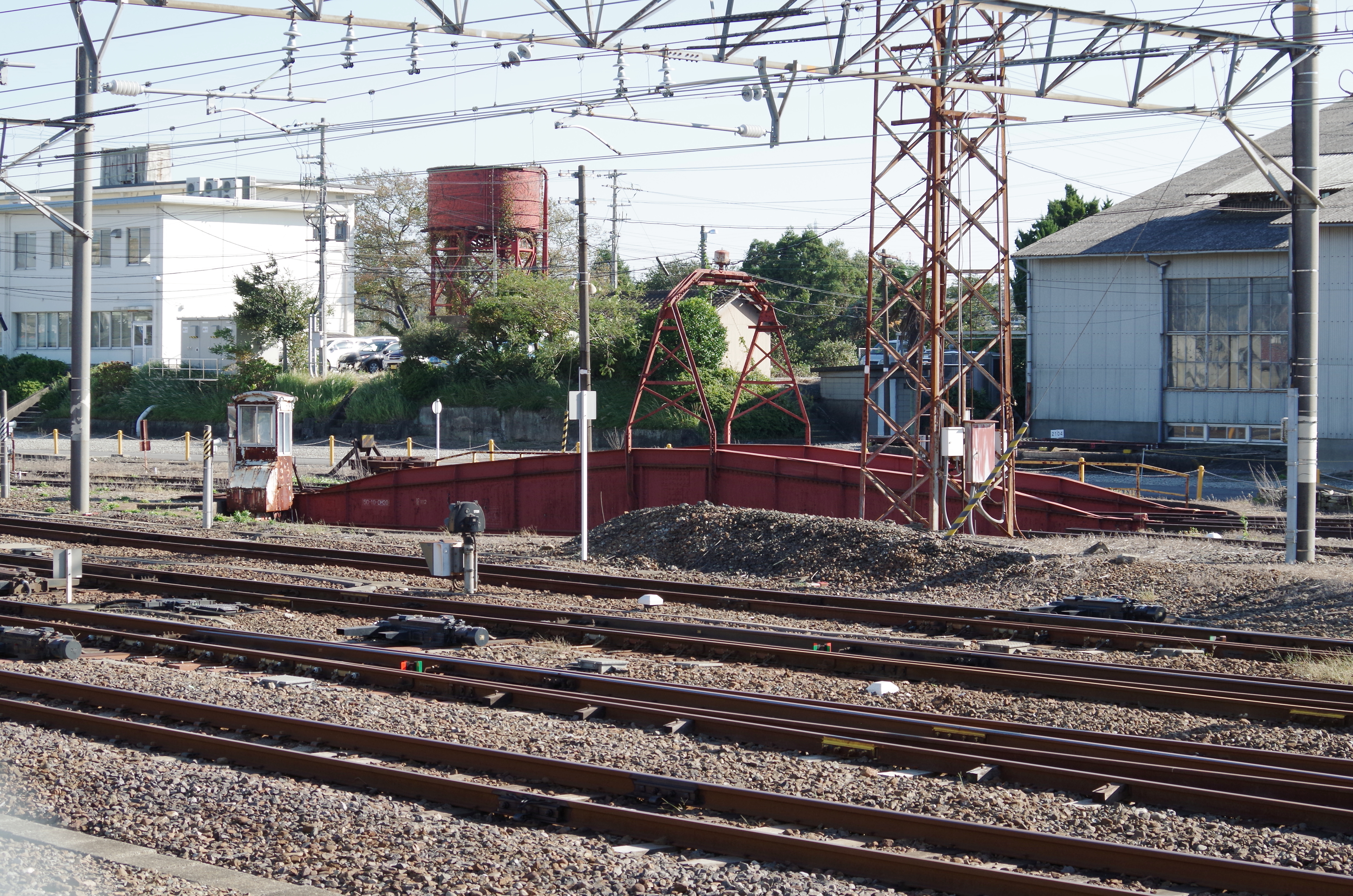 亀山鉄道部（JR西日本） 亀山転車台